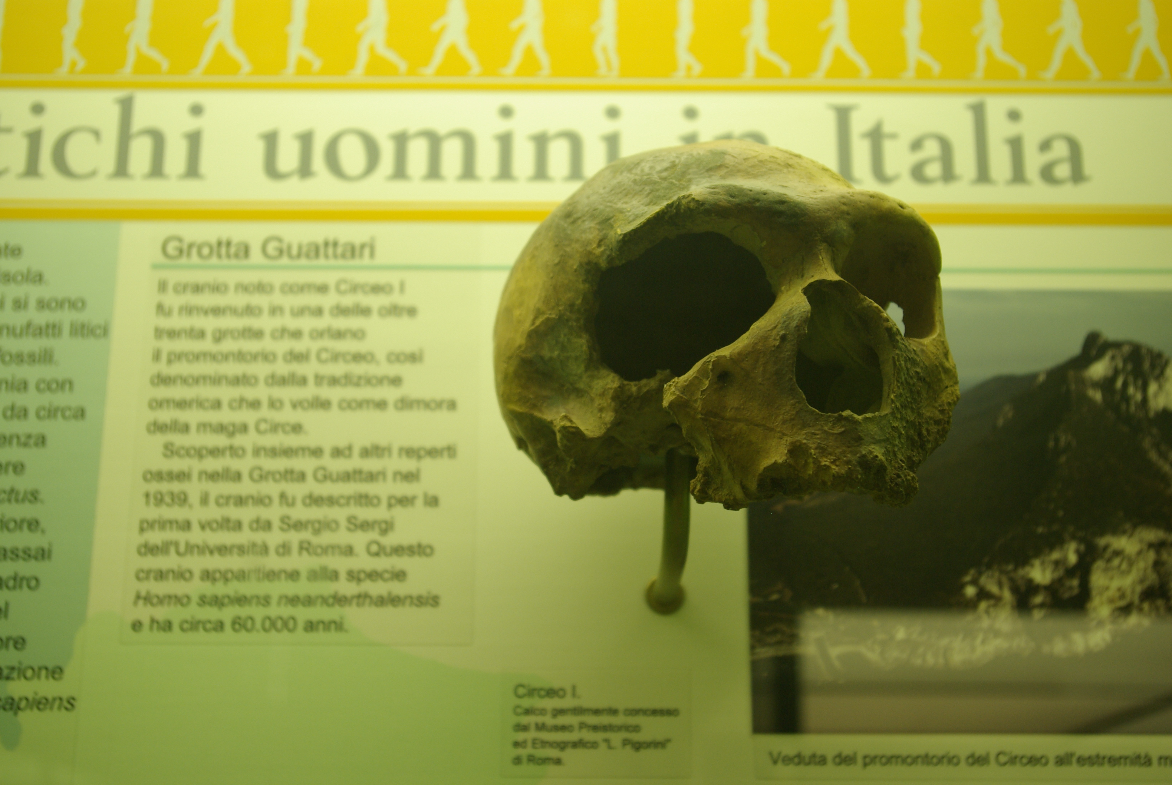 Museo civico di storia naturale This is a photo of a monument which is part of cultural heritage of Italy.